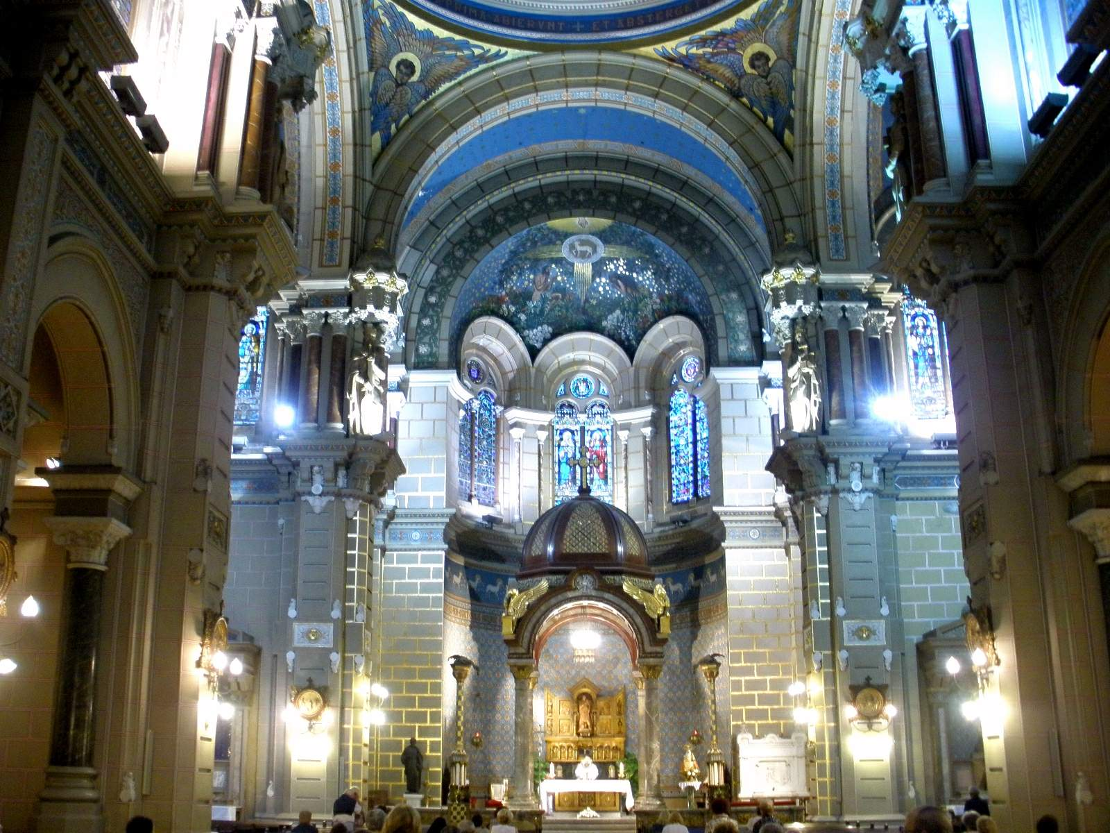 Church of San Juan el Real, Oviedo